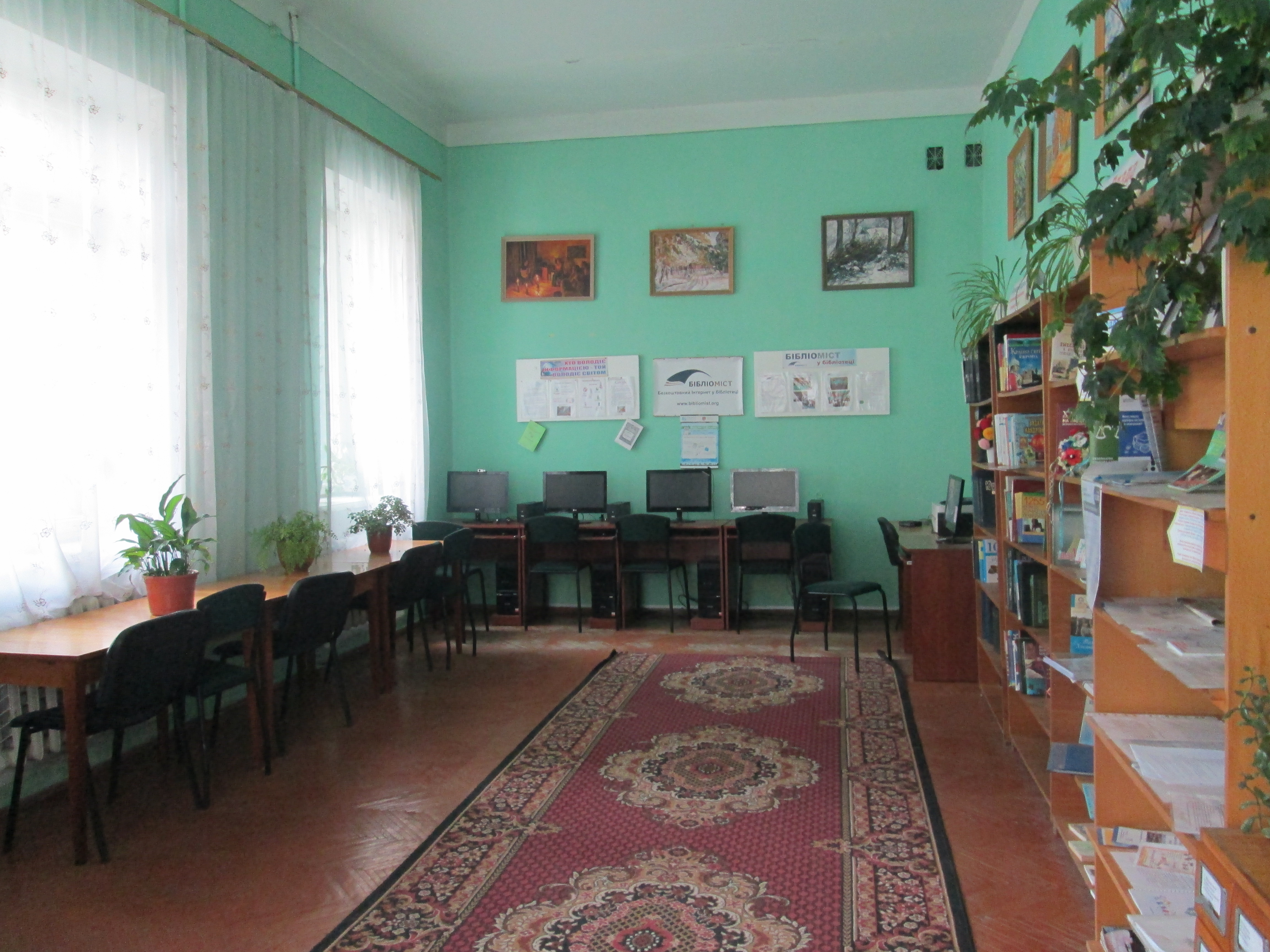 Читальний зал бібліотеки-філії №2 Хмельницької міської ЦБС, травень 2019.